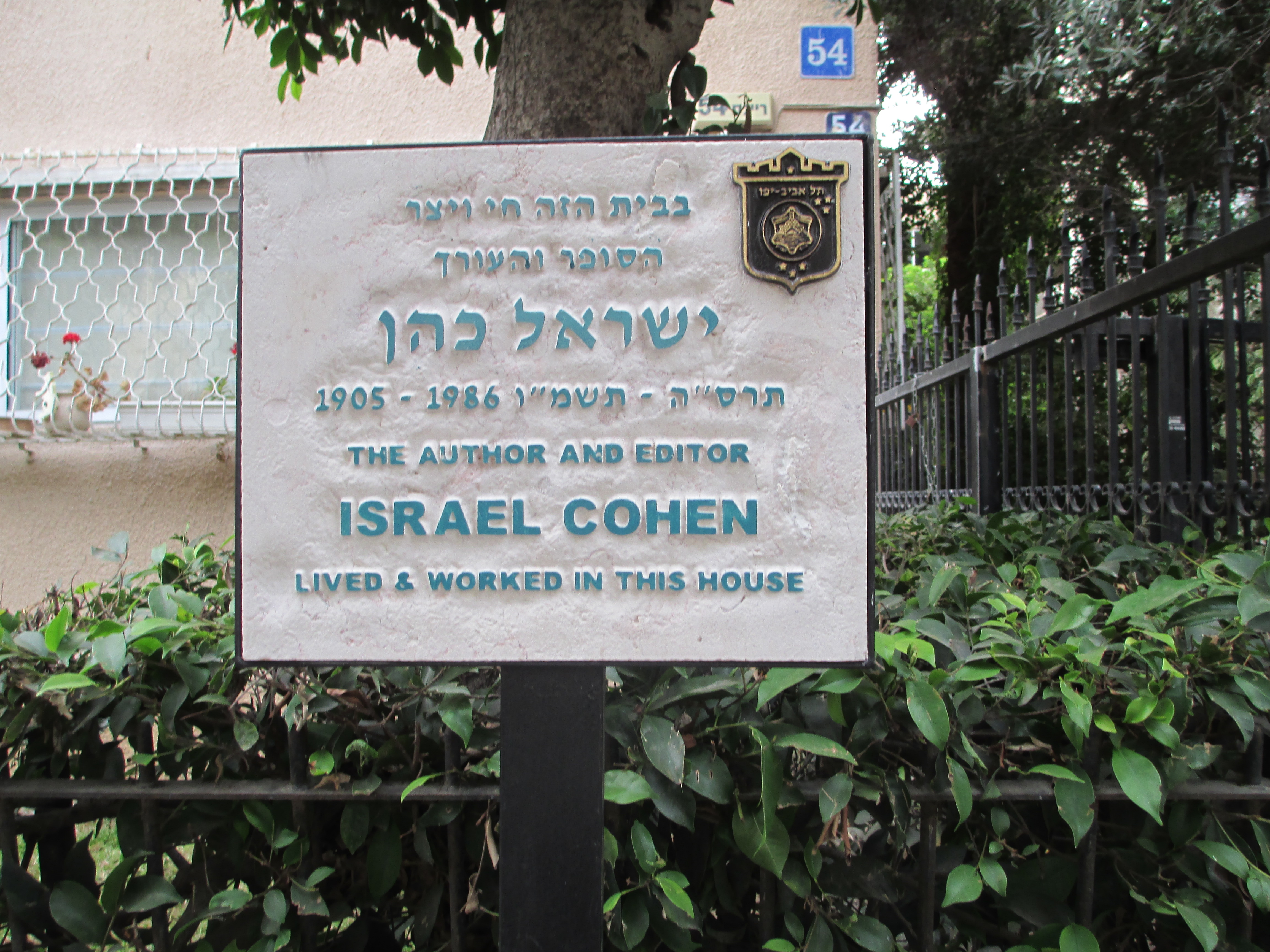 לוחית זיכרון לסופר ישראל כהן ברח' ריינס 54 בתל אביב